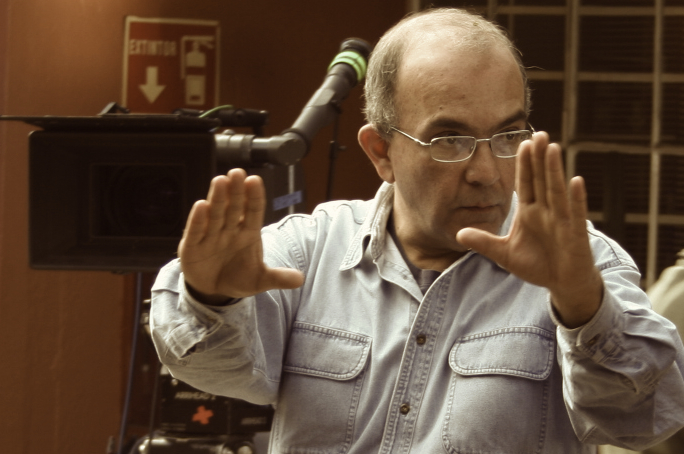 El Director de Cine Rafael Montero en la filmación de su película La Cama